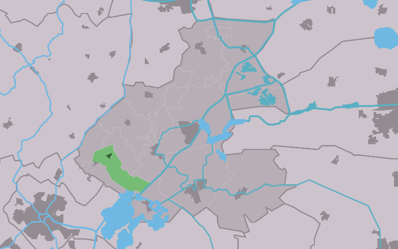 Kaartsje fan himrik fan Tersoal